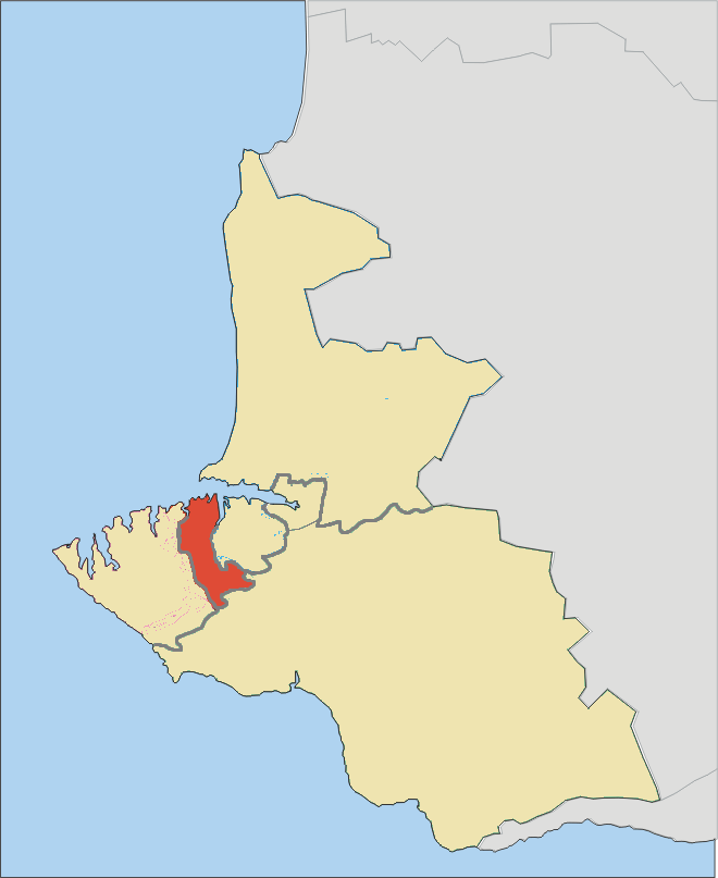 Ленинский район Севастополя